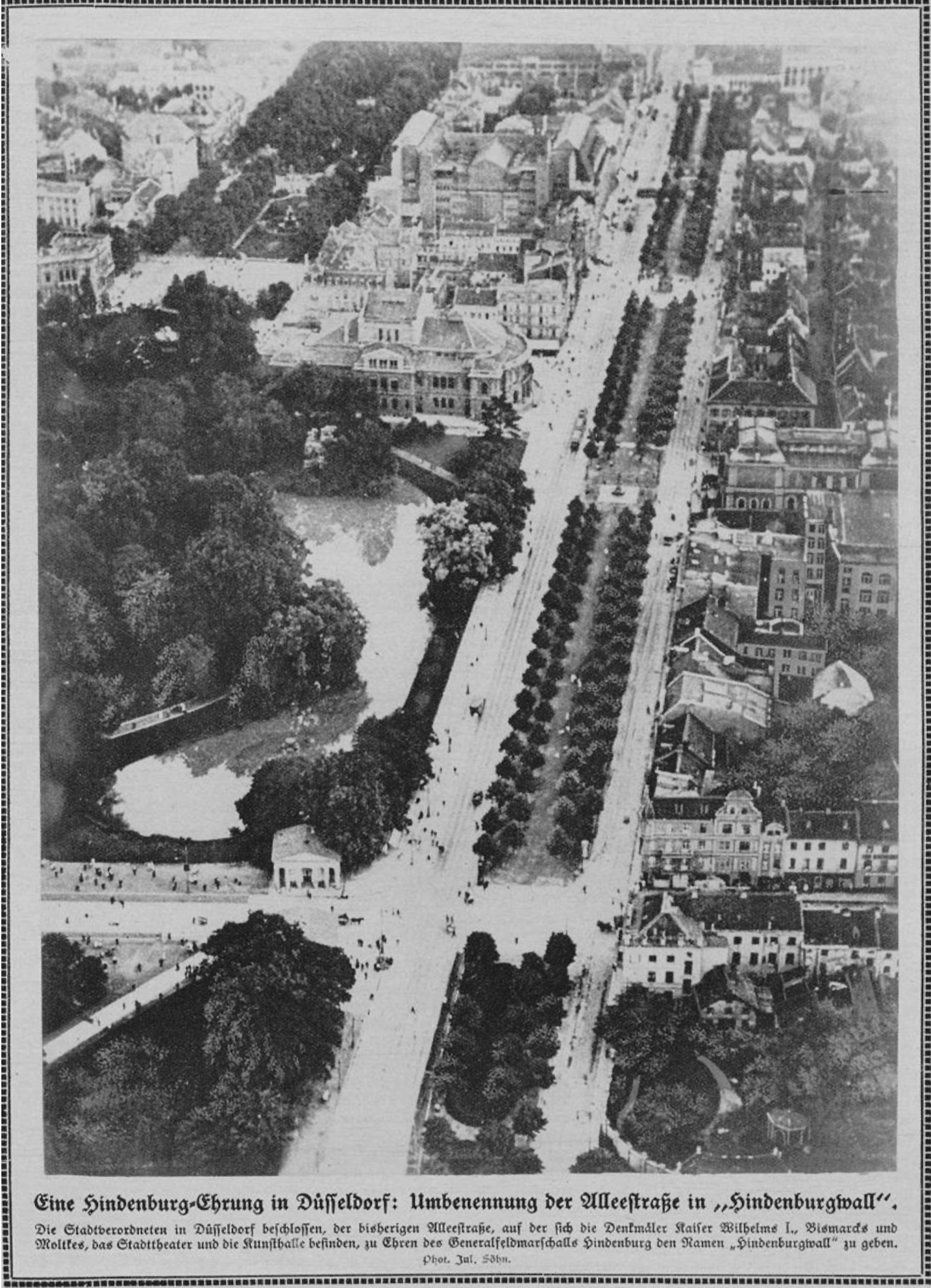 Umbenennung der Alleestraße in Hindenburgwall, Oktober 1915